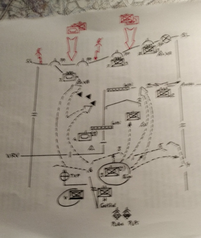 Operationsplan eines PzGrenBtl mit Einteilung der Kräfte zwischen SL - Sicherungslinie und VRV